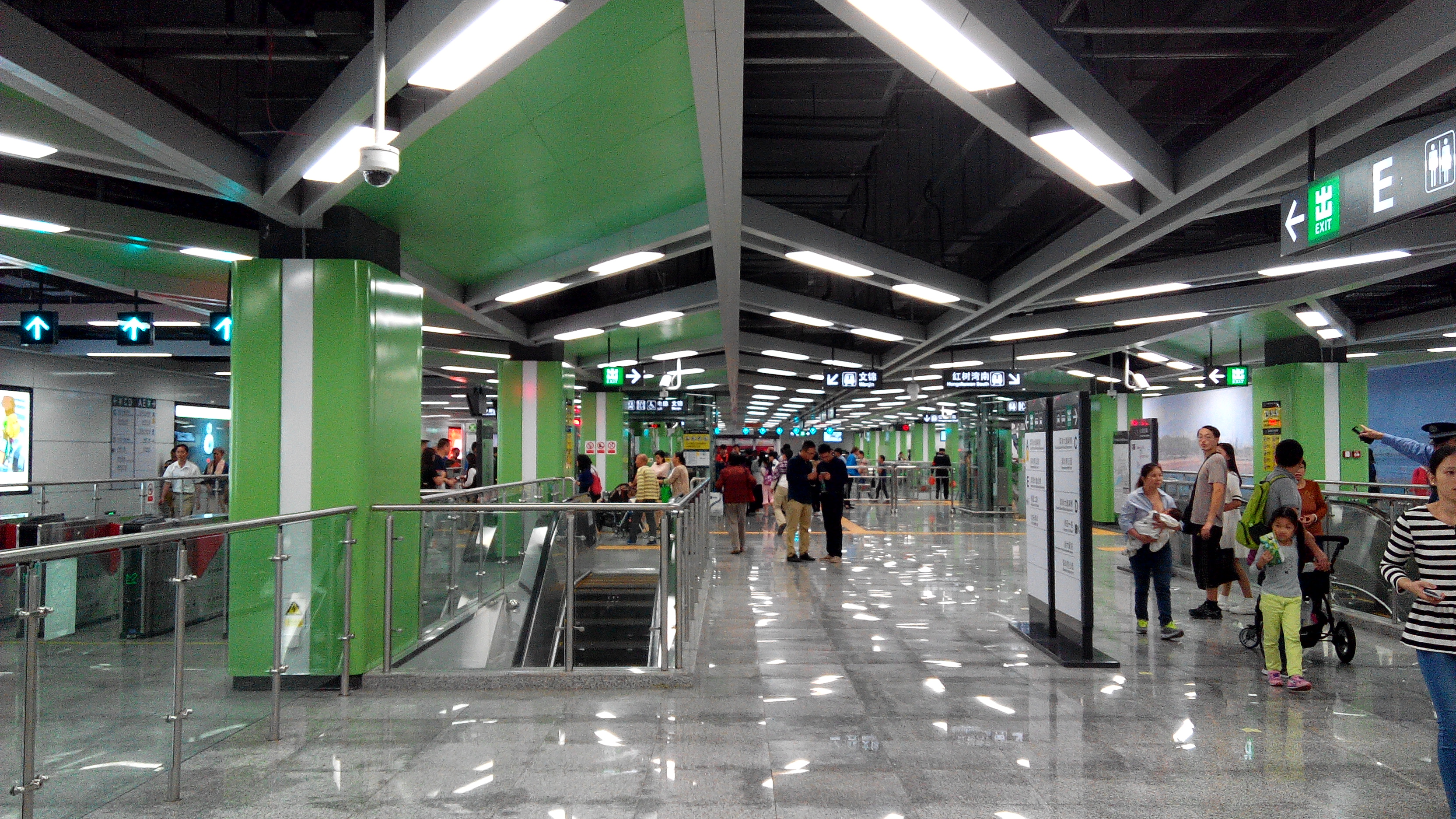 深圳地铁9号线 深圳湾公园站站厅